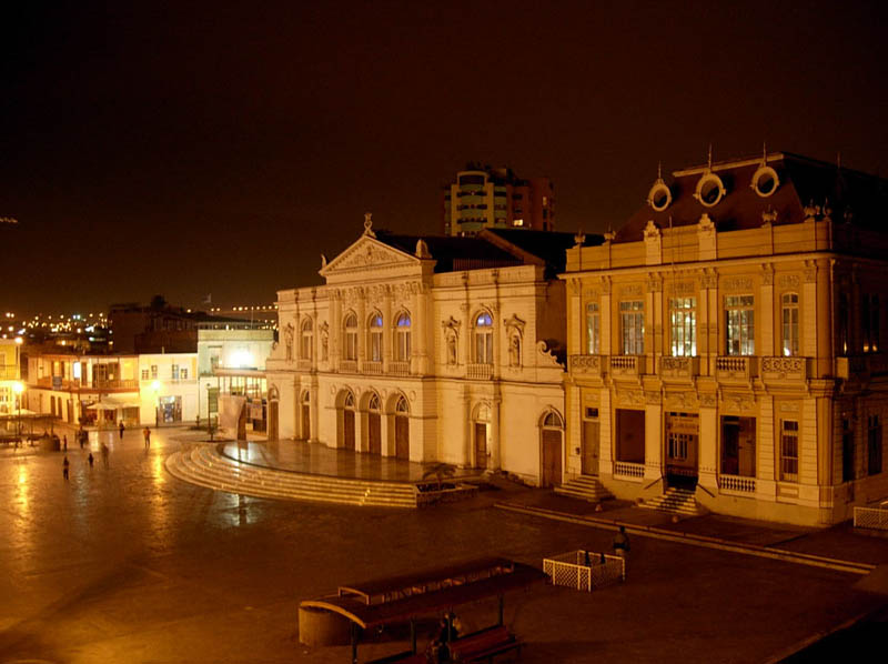 teatro municpal de iquique, foto de autoria propia.